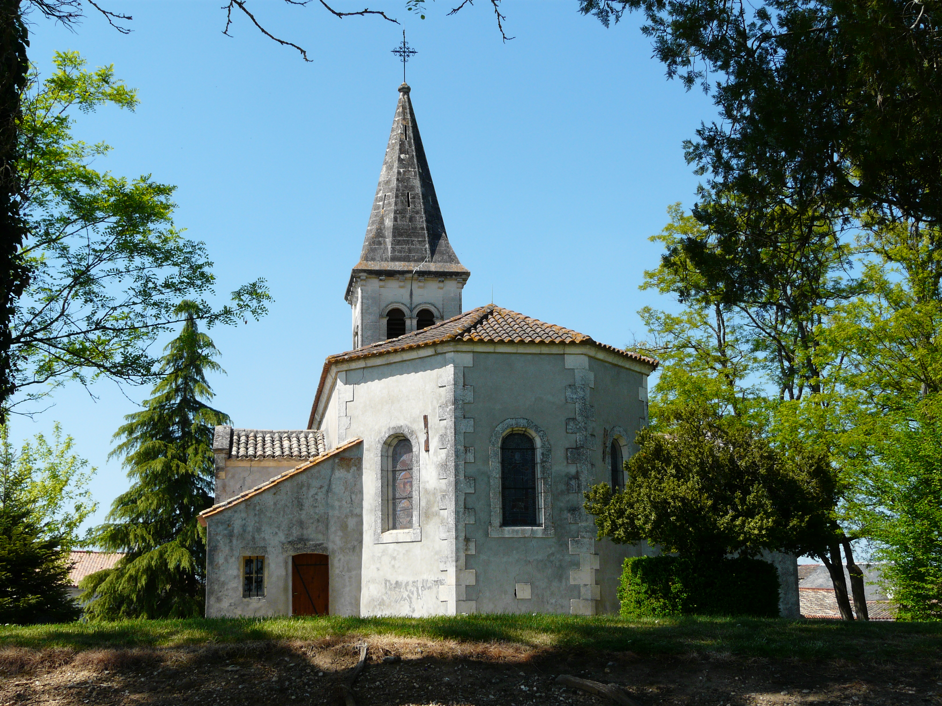 Le chevet de l'église d'Eygurande, Eygurande-et-Gardedeuil, Dordogne, France.